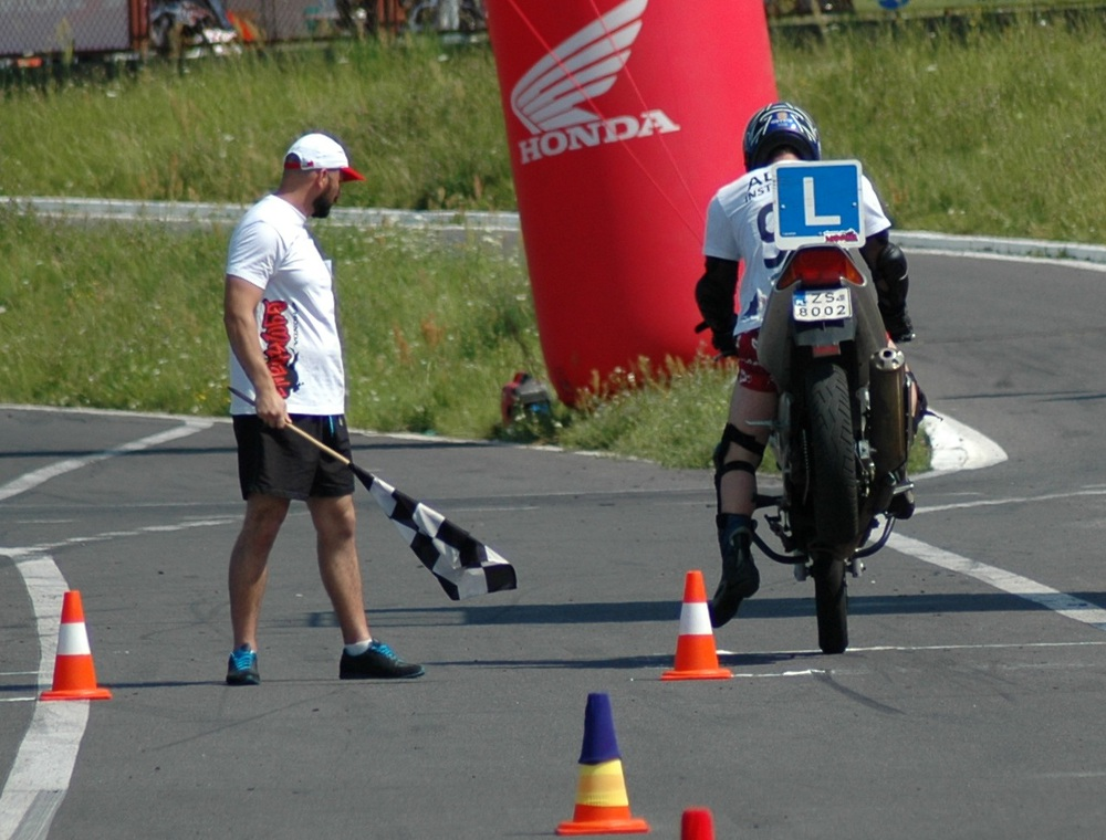 Sędzia sprawdza czy zawodnik nie najechał na linię w kopercie mety. Adam Sylwanowicz na 2. rundzie Honda Gymkhana, Radom, 8 lipca 2012